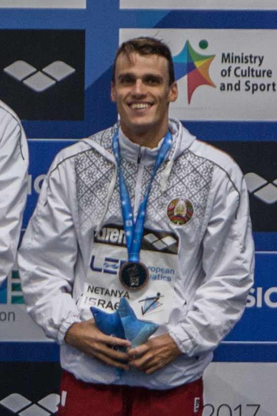 השחיין פבל סנקוביץ' עם מדליית הארד בה זכה במשחה השליחים ל-50X4 מטרים מעורב מעורב באליפות אירופה בבריכות קצרות בנתניה, 2015